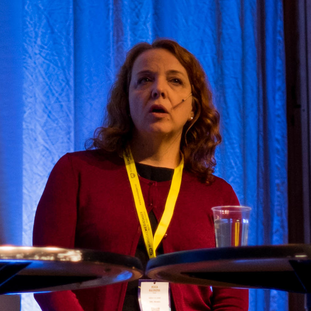 Medvirkende: Barbara Trionfi, Beata Balogova, Gergo Saling Mod: Ole Torp